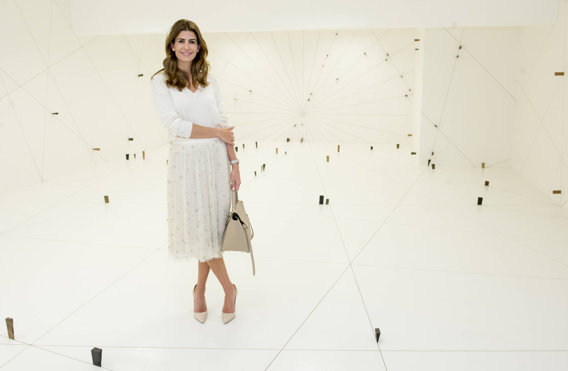 La primera dama, Juliana Awada, visitó la primera edición de la BienalSur, una muestra de arte contemporáneo que organiza la Universidad Nacional de Tres de Febrero con el propósito de integrar las variadas expresiones culturales de Sudamérica y cuyas exposiciones se extenderán hasta el mes de diciembre en 16 países de todos los continentes.